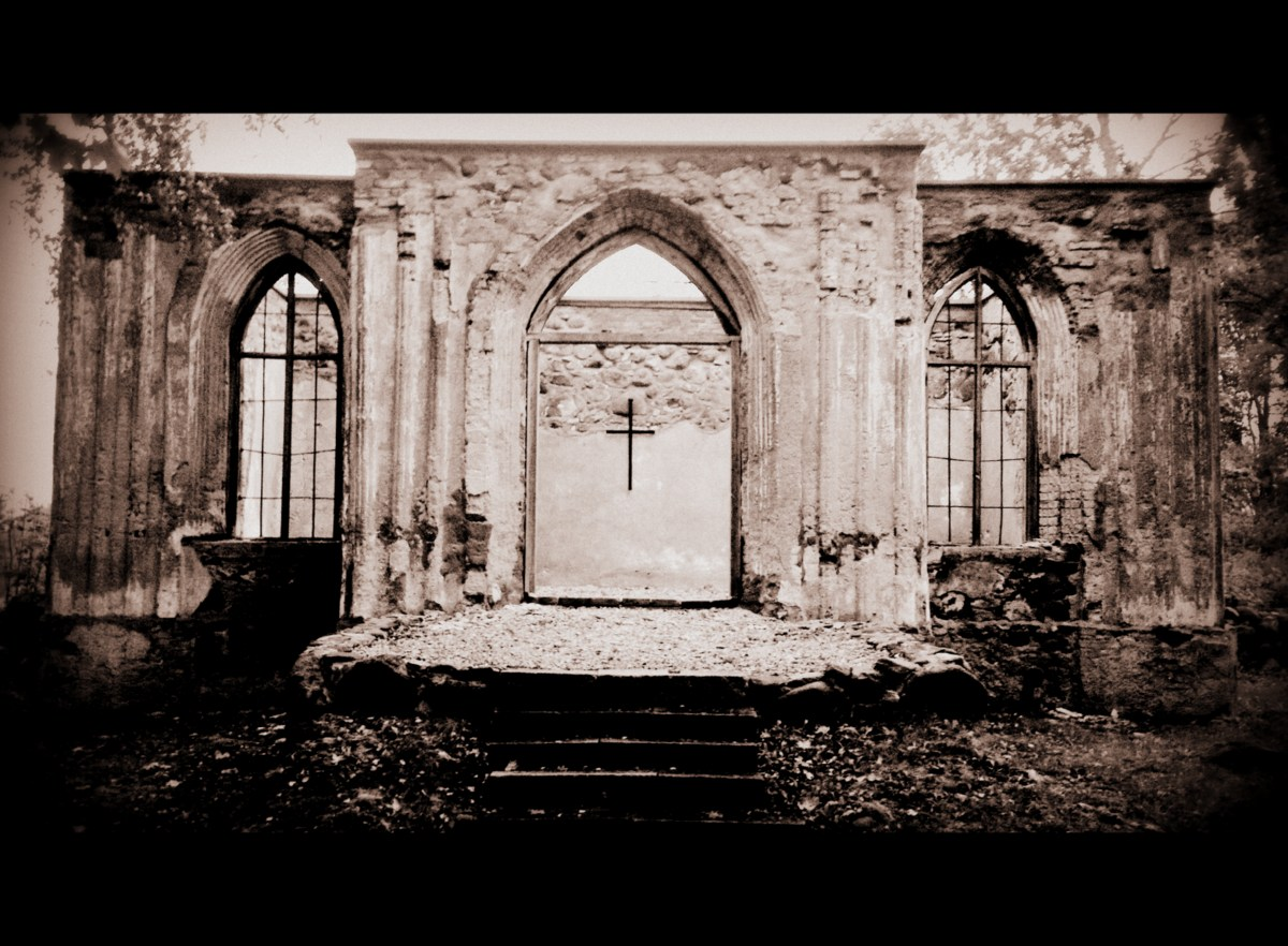 Kabala mõisa kalmistu on kalmistu Meossaare külas Türi vallas. Selle rajasid Pilistvere kihelkonnas asunud Kabala mõisa tollased omanikud Vietinghoffid umbes 1830. aastatel ning see jääb kunagisest mõisakeskusest linnulennult umbes 1,7 km kaugusele lõunakagusse. Kalmistu lääneosa serval paikneb matusekabel, mis praegu on varemetes. Kalmistule maetud inimeste arv ei ole teada.